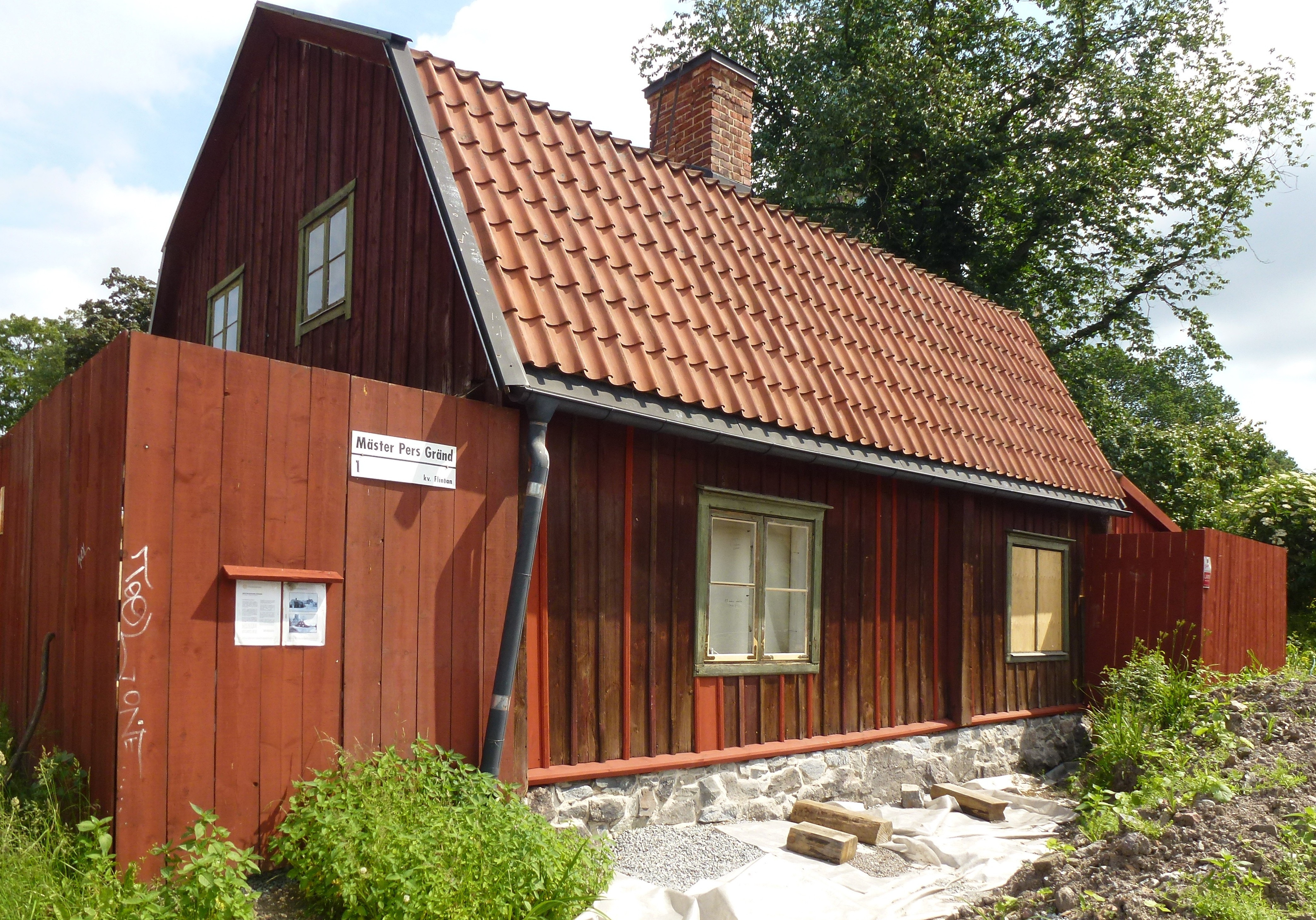 Mäster Pers gränd nummer 1 under renovering. Fram till renoveringen 2011 fanns varken vatten, el eller avlopp indraget. Vatten hämtades från en pump på Bergsprängargränd och på gården stod ett avträde.